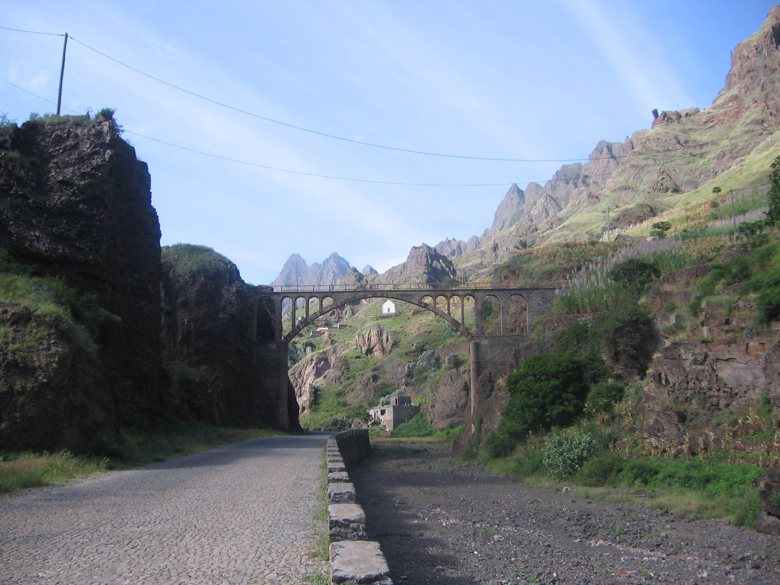 Aqueduto para transposição do vale da ribeira Grande, Santo Antão, Cabo Verde